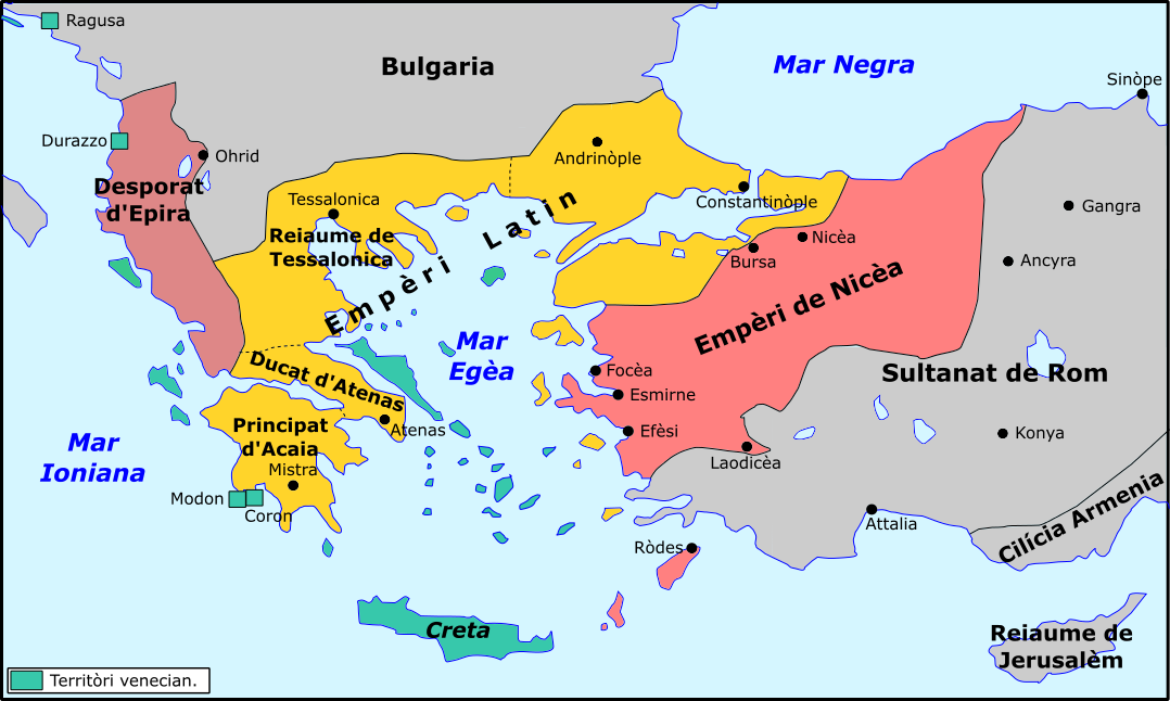 Partiment de l'Empèri Bizantin après la Quatrena Crosada (vèrs 1214).